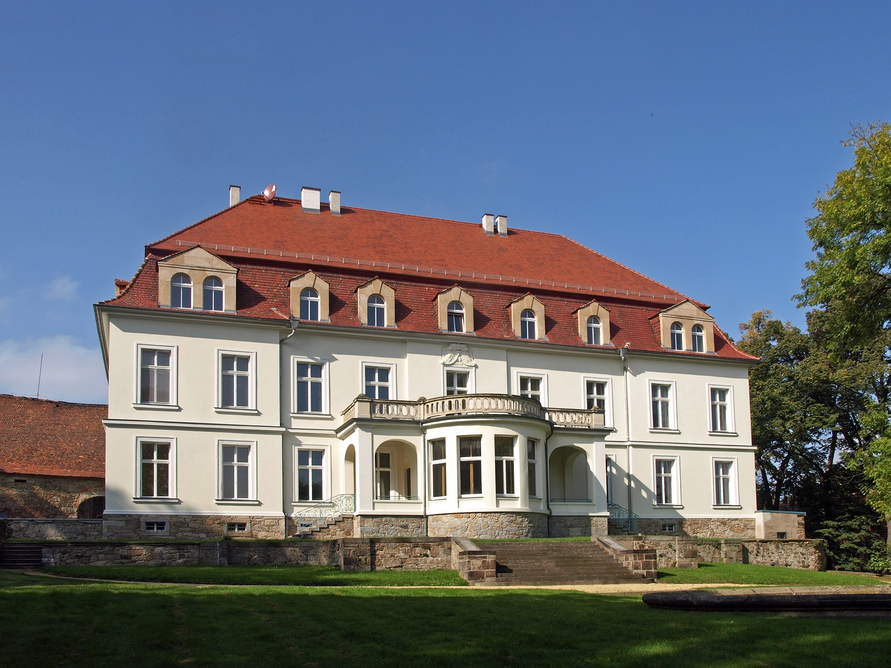 Schloss Drehsa Hornjoserbsce: Droždźijski hród